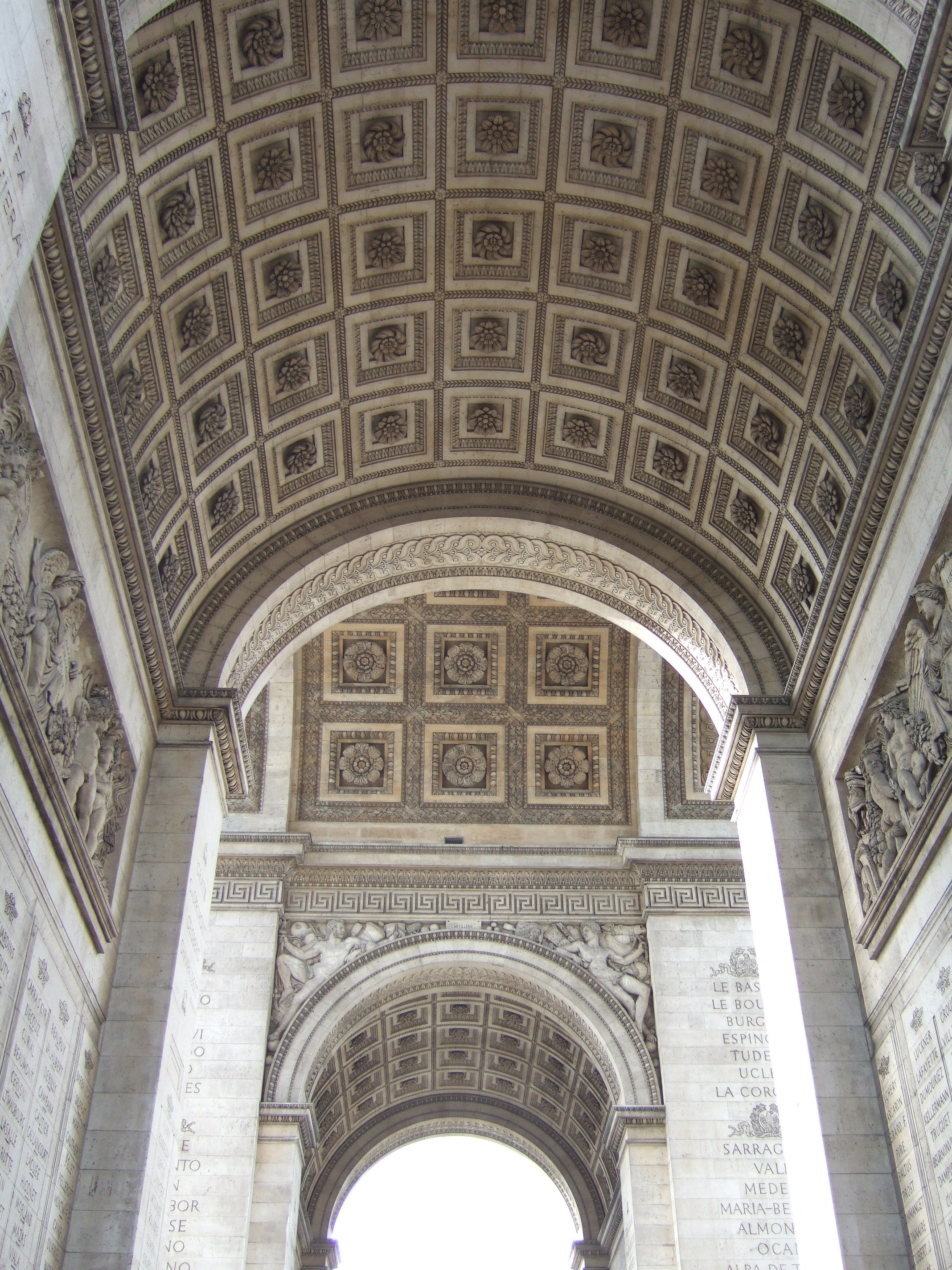 Der Arc de Triomphe aus der Froschperspektive